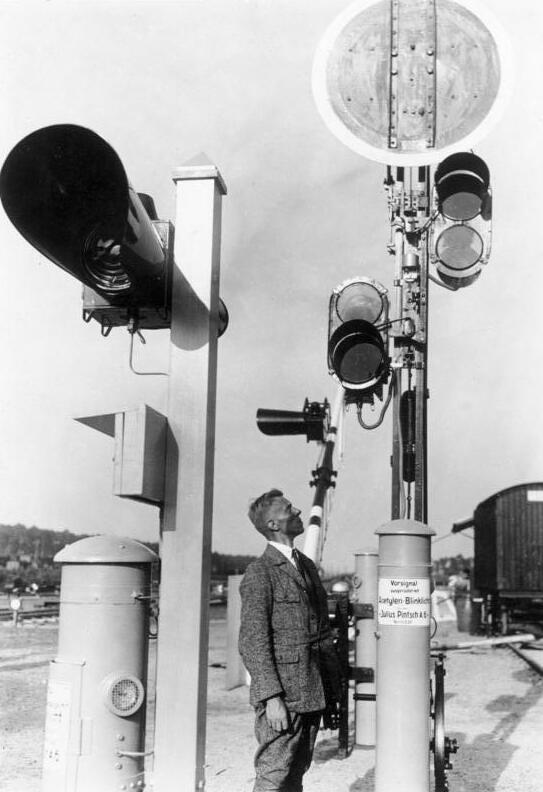 Eine neue technische Signalanlage für schrankenlose Uebergaenge bei der Deutschen Reichsbahn! Diese Signalanlage gibt die Annäherung eines Zuges aus 1000 m Entfernung durch Blinkzeichen bekannt.